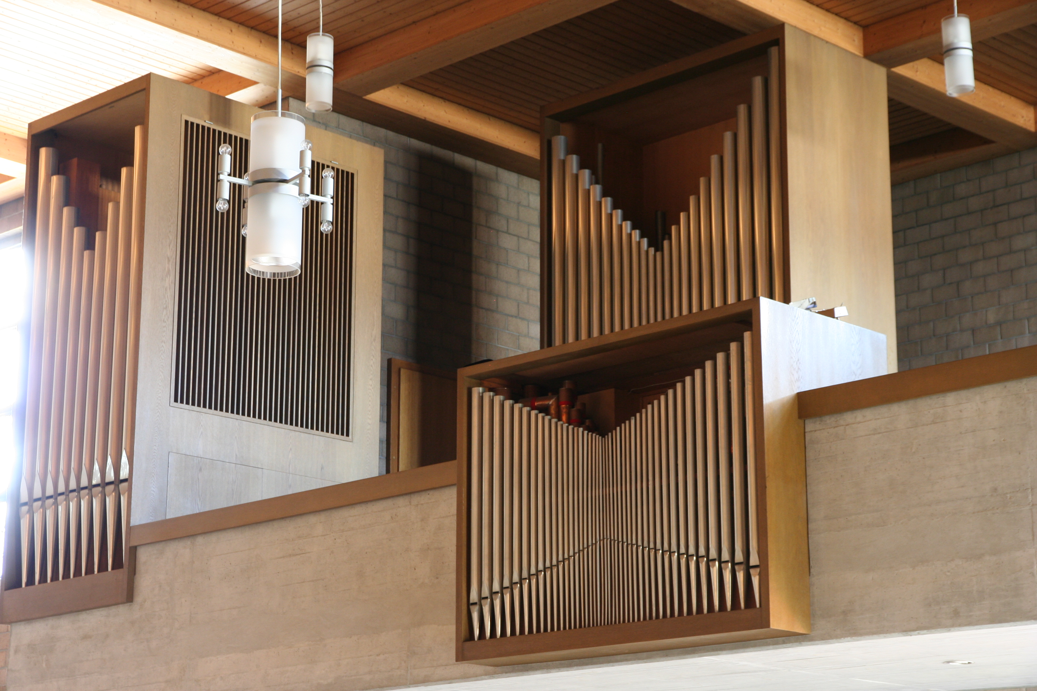 Römisch-katholische Kirche Bruder Klaus Diessenhofen TG